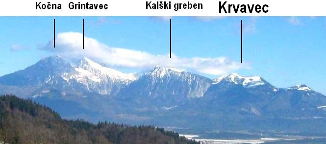 Kamniško-Savinjske Alpe, Slovenia; range of mountains Kočna, Grintavec, Kalški greben, Krvavec (ski resort) photo:Ziga 17:52, 4 February 2007 (UTC)